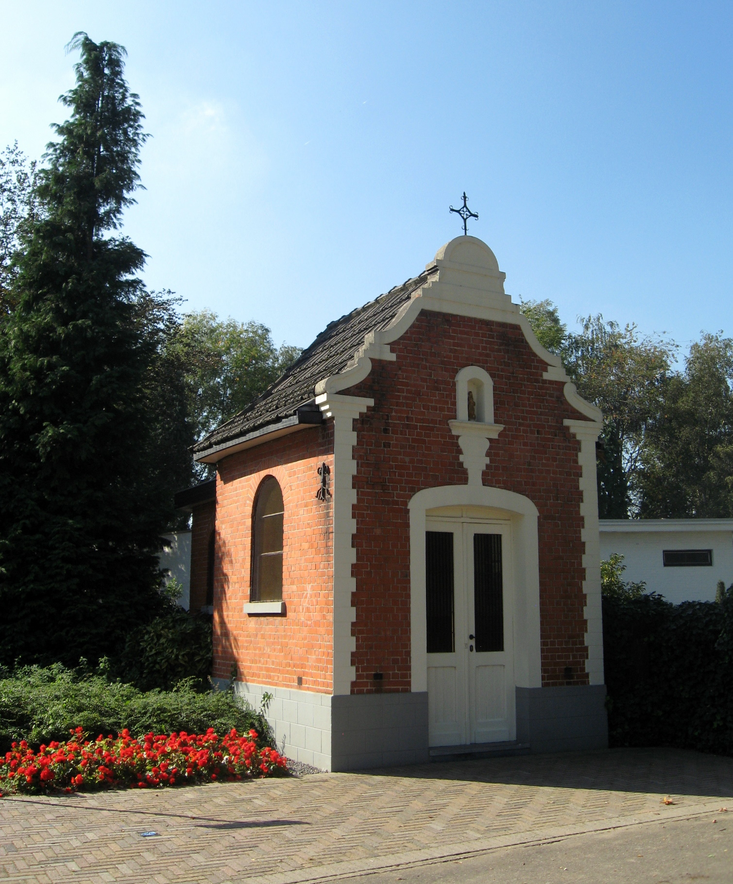 Onze-Lieve-Vrouwkapel van d'Ierd in Genk